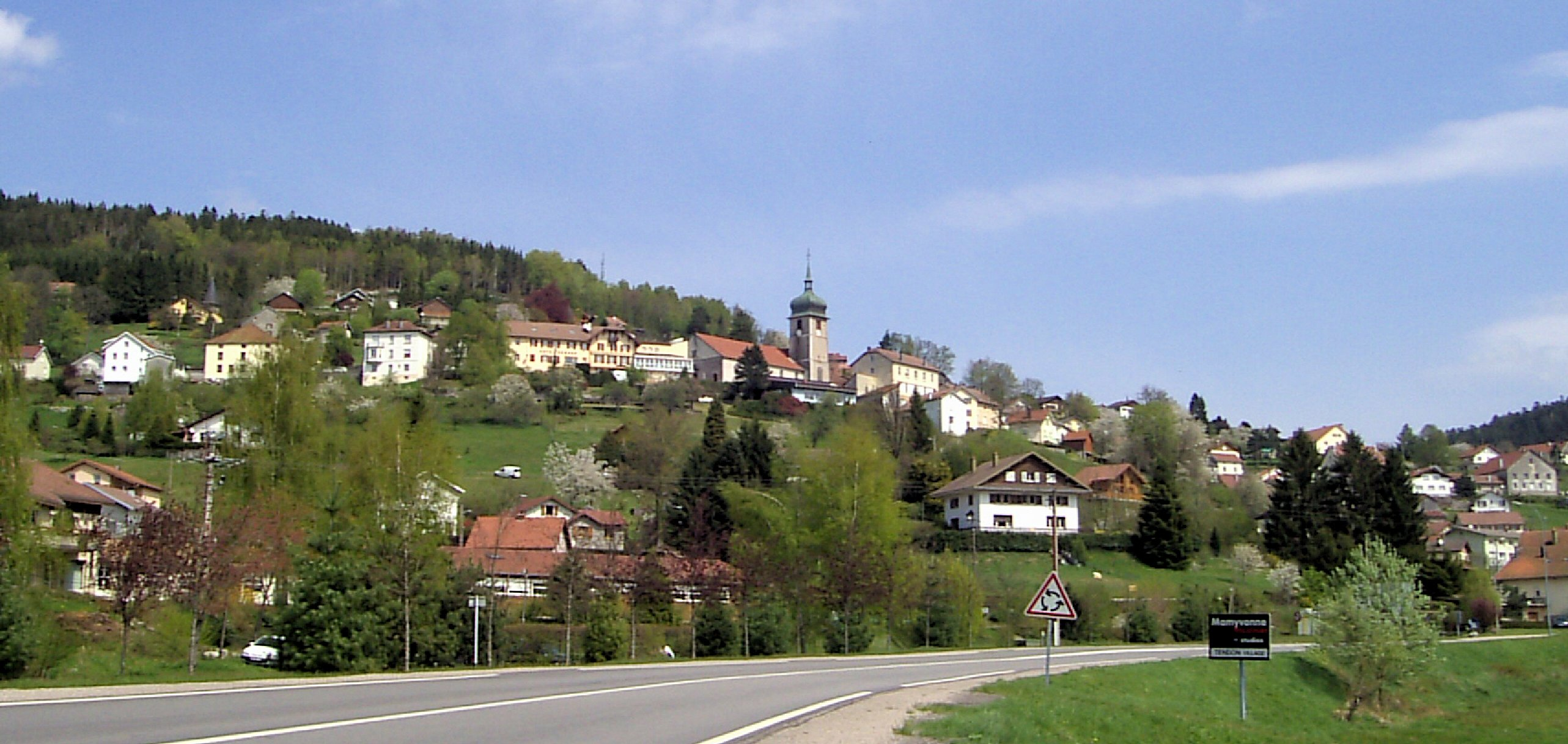 Le Tholy, Département Vosges, France